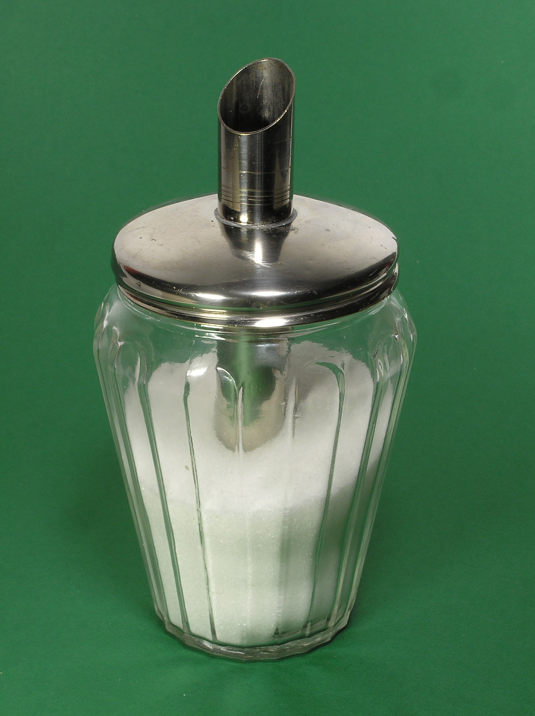 Zuckerstreuer "süßer Heinrich" der Firma Hely